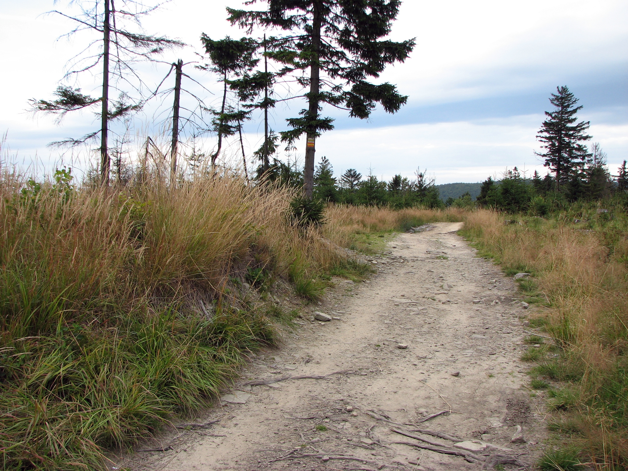 Stołów w Beskidzie Ślaskim